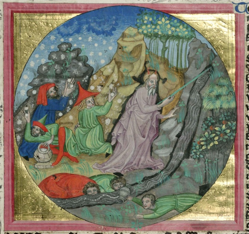 Bible boskovická, Vědecká knihovna v Olomouci (signatura M III 3). folio 0021r, detail: iluminace Izraelci na poušti sbírají manu, Mojžíšův zázrak s pramenem.